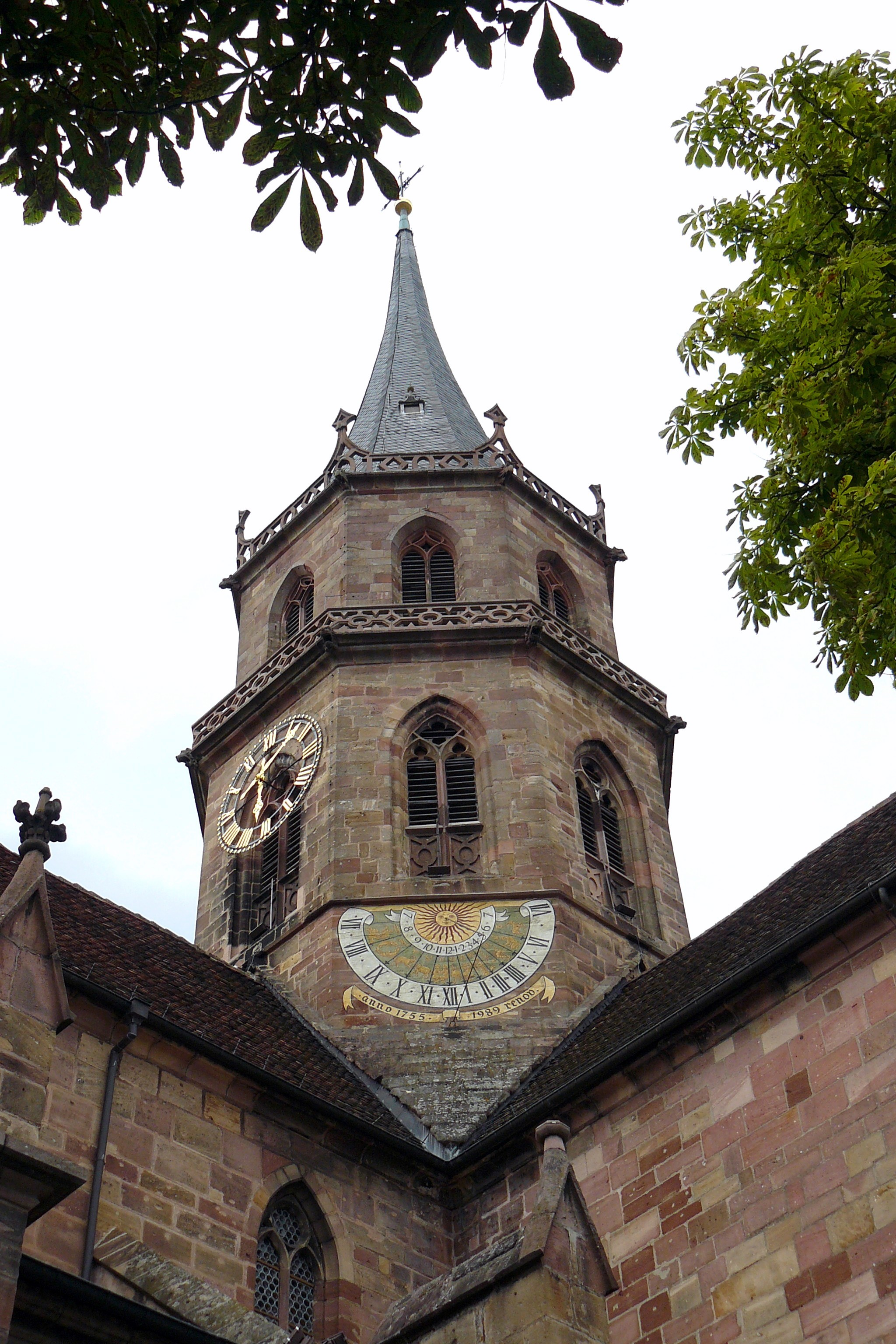 Clocher de l'église de Soultz-Haut-Rhin (Haut-Rhin, Alsace, France) avec cadran solaire restauré